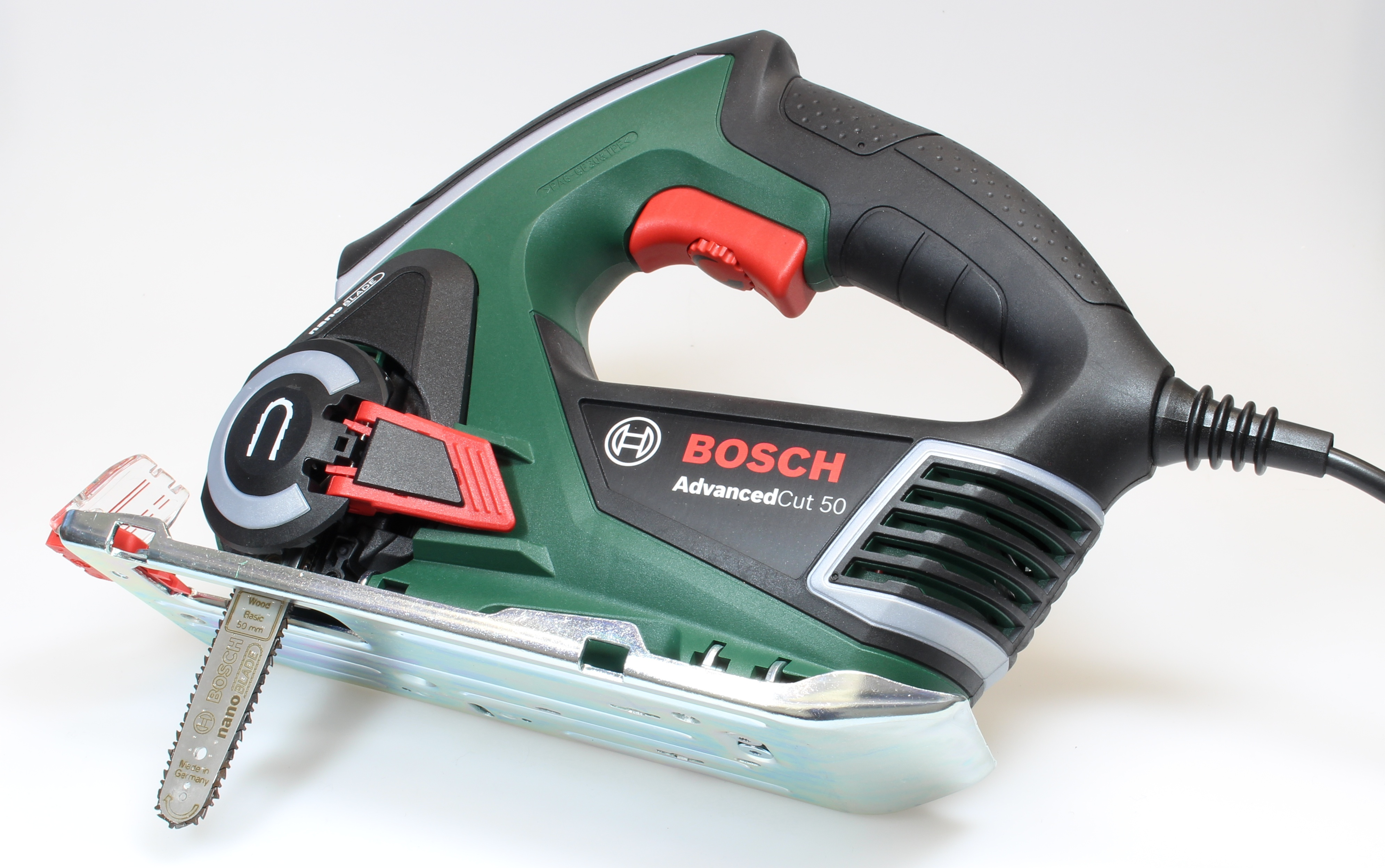 Bosch AdvancedCut 50 Nano Blade Chainsaw